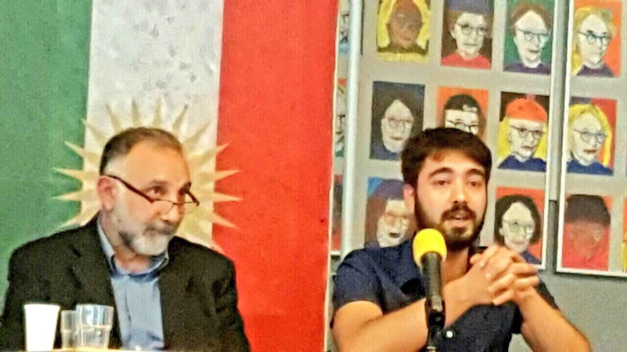 PAKURD Sözcüsü Sidar Halman